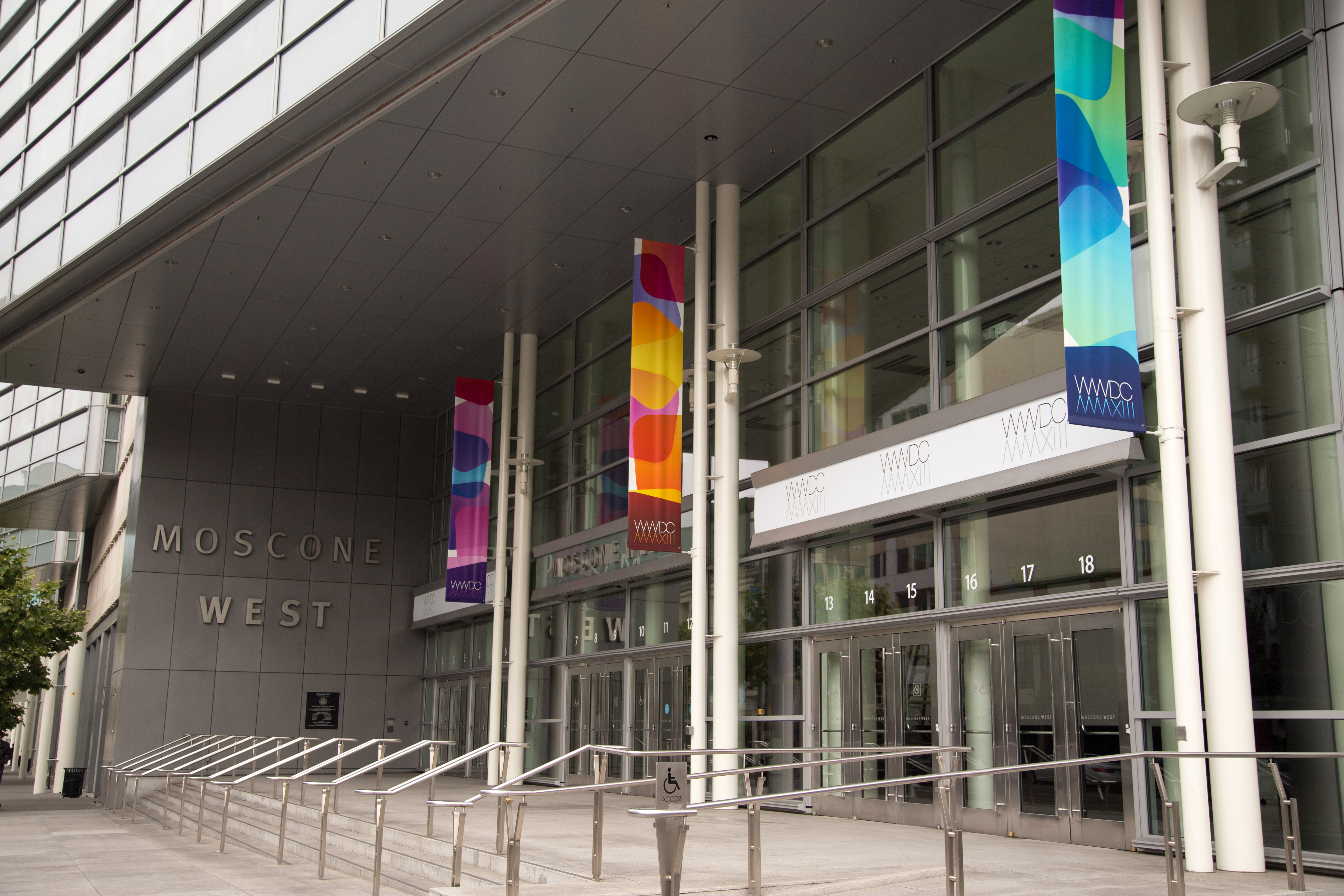 Moscone West Entrance